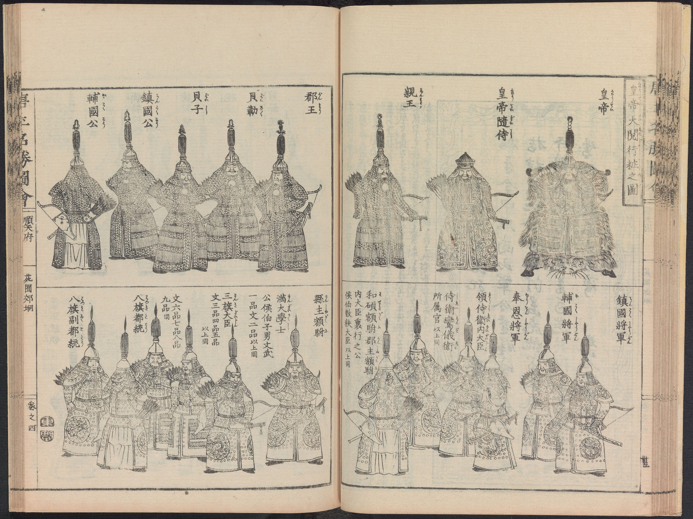 皇帝大阅行粧之图，出自《唐土名胜图会》卷四